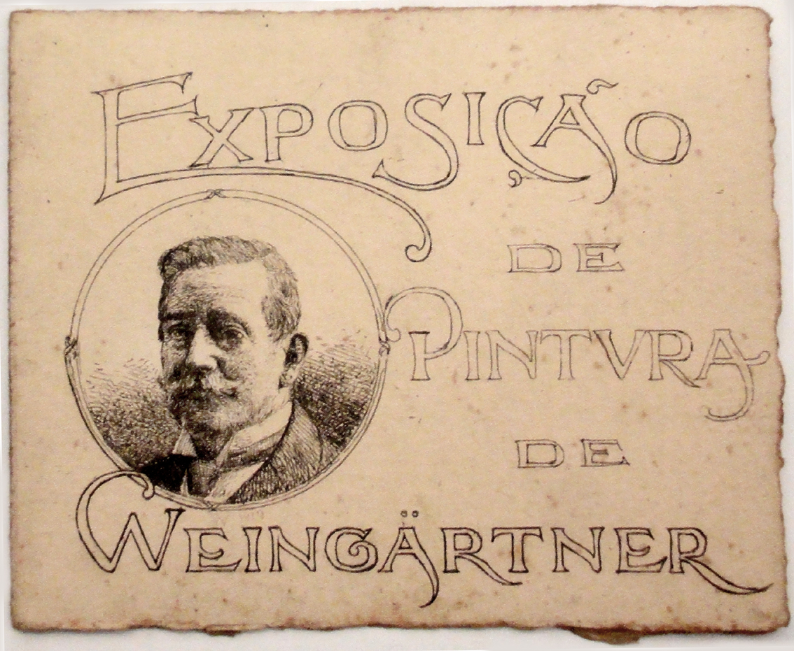 Convite de exposição de Pedro Weingärtner com auto-retrato. Gravura em metal, 10,7x13cm